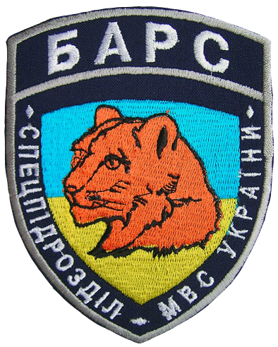 Емблема бригади спеціального призначення «Барс» МВС України.